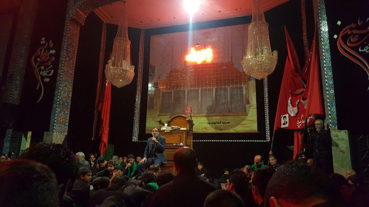 محمد علی ابراهیمی در حال مدیحه سرایی اهل بیت در حسینیه عرب ها (کربلایی ها)